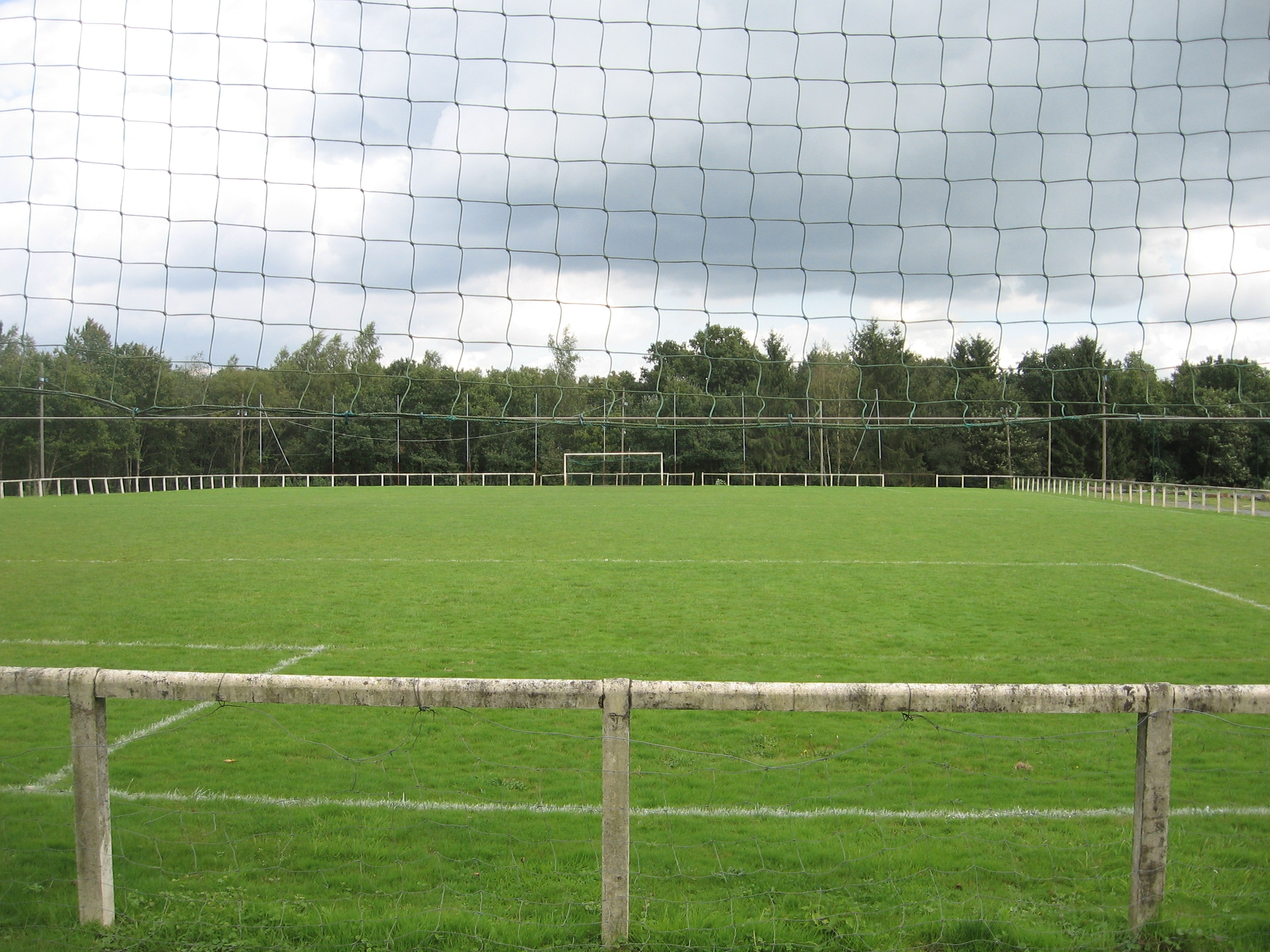 Terrain de foot de Rimogne